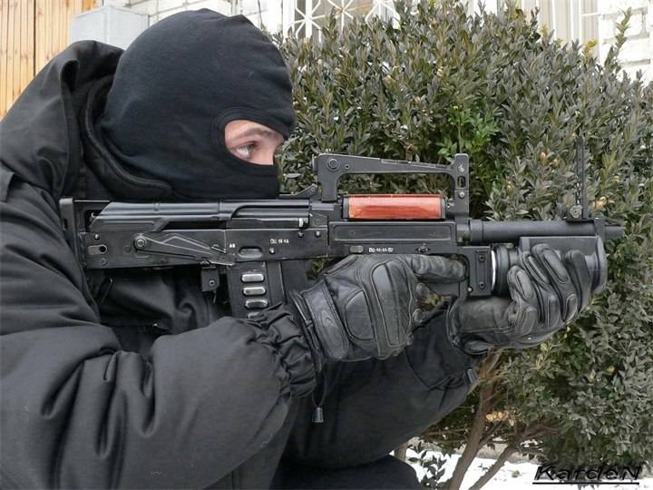 Прицеливание на ОЦ-14 "Гроза"